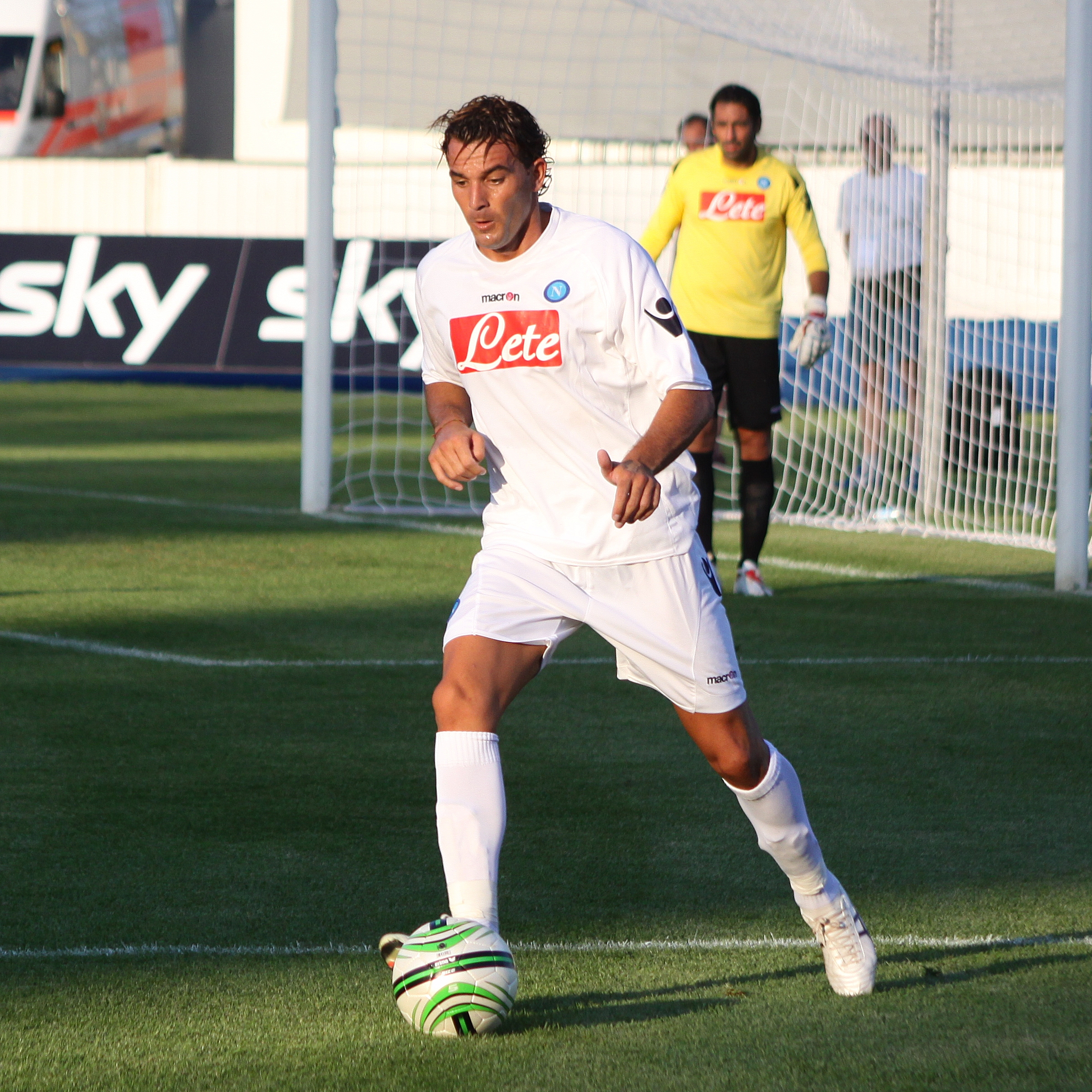 Salvatore Aronica - SSC Neapel (3) Salvatore Aronica - Società Sportiva Calcio Napoli